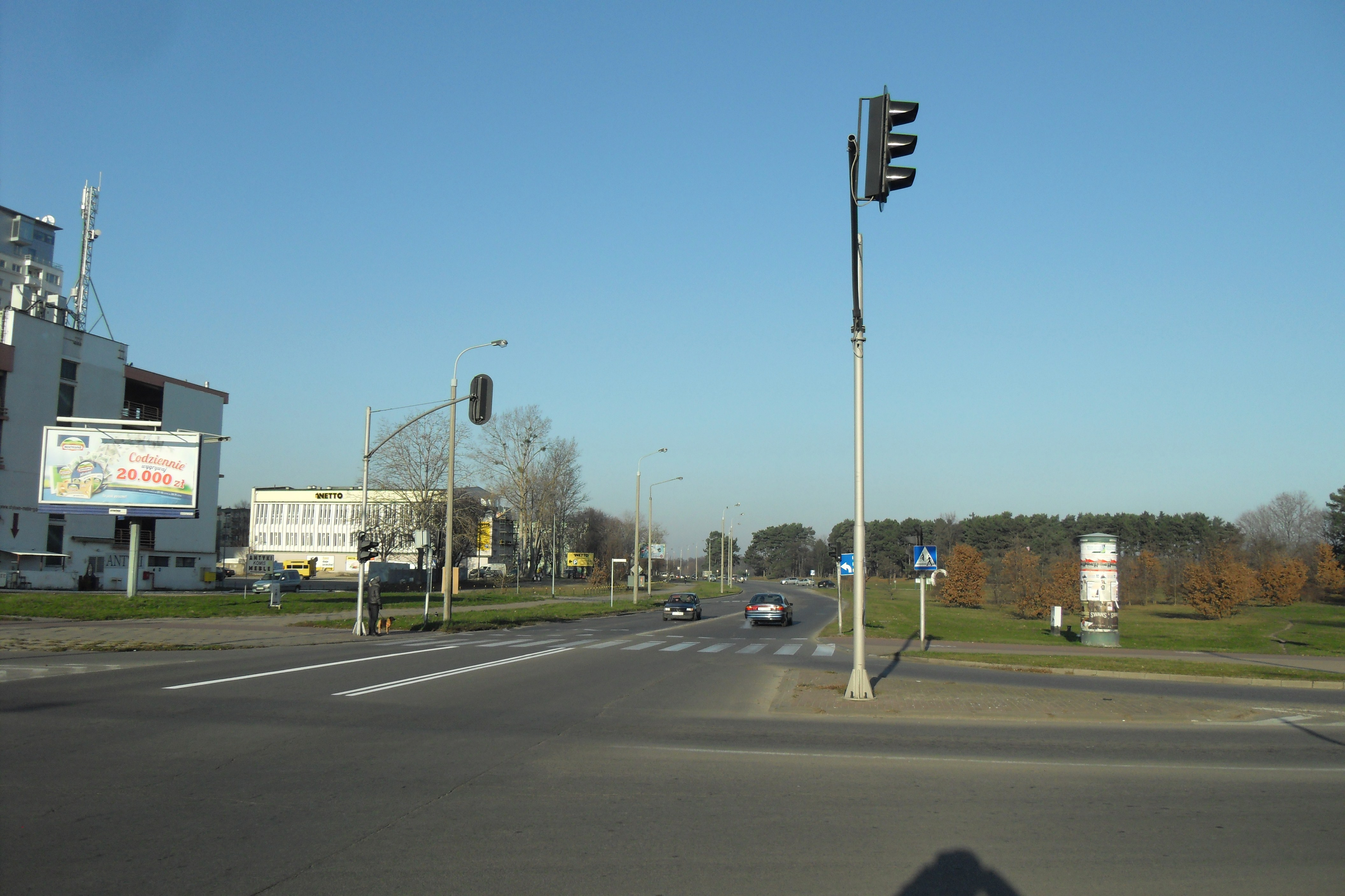 Gdańsk Przymorze Wielkie (Czarny Dwór), ul. Dąbrowszczaków.